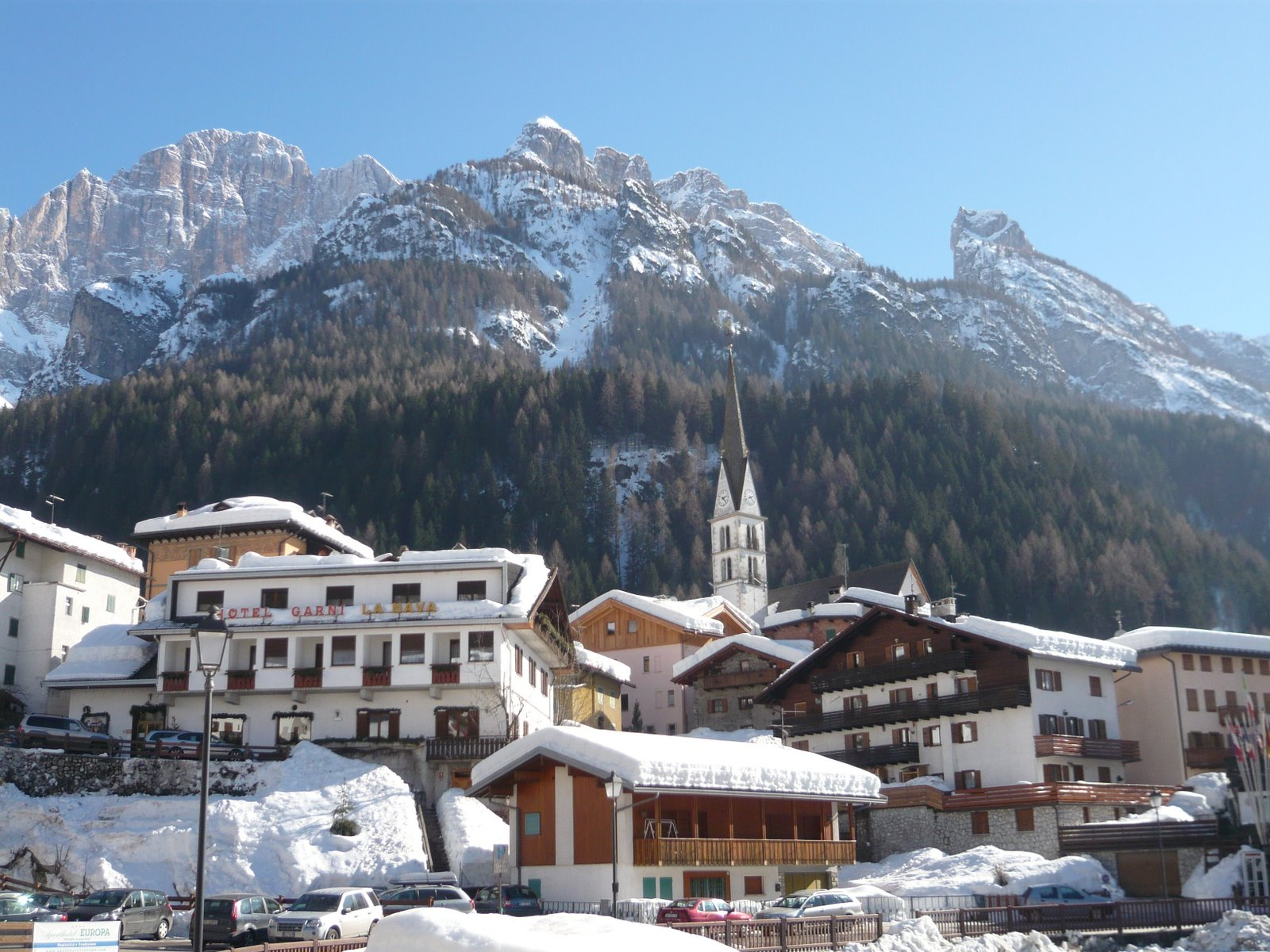 Вид на Аллеге и горный массив Чиветта со стороны Аллегского озера. В кадре Церковь с колокольней, гостиница Garni La Nava, на заднем плане - горный массив Civetta.